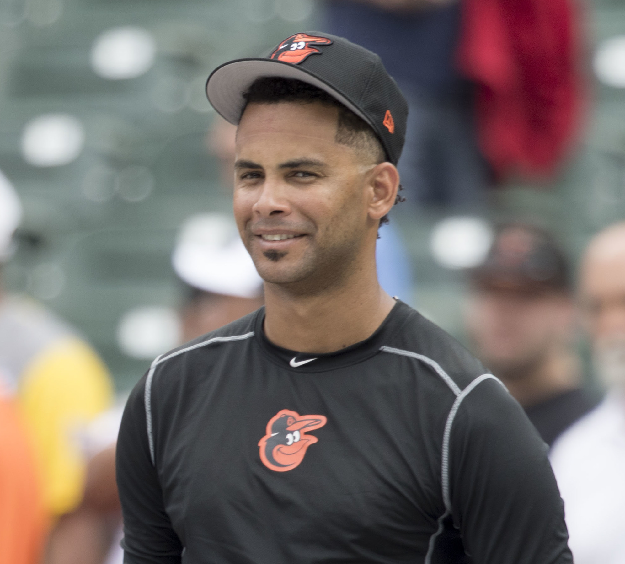 Yankees at Orioles 9/5/17